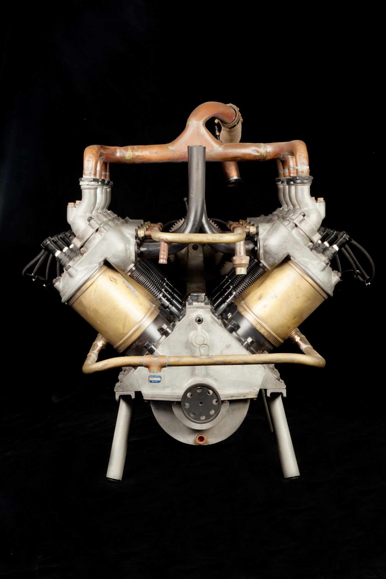 Motore aeronautico Antoinette, esposto al Museo nazionale della scienza e della tecnologia Leonardo da Vinci di Milano.